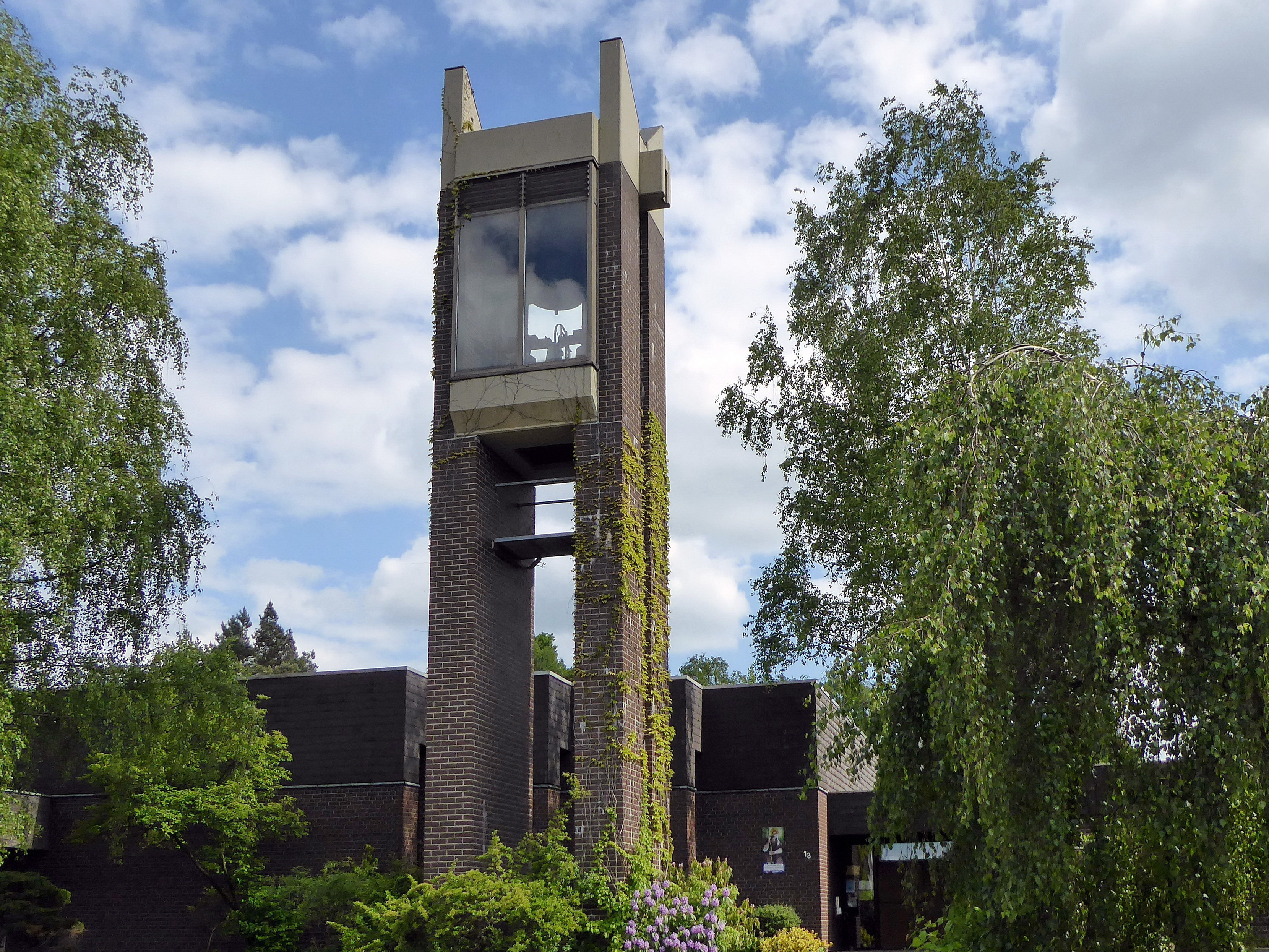 Die evangelisch-lutherische Christophorus-Kirche liegt in Altwarmbüchen (Gemeinde Isernhagen) an der Bernhard-Rehkopf-Straße.